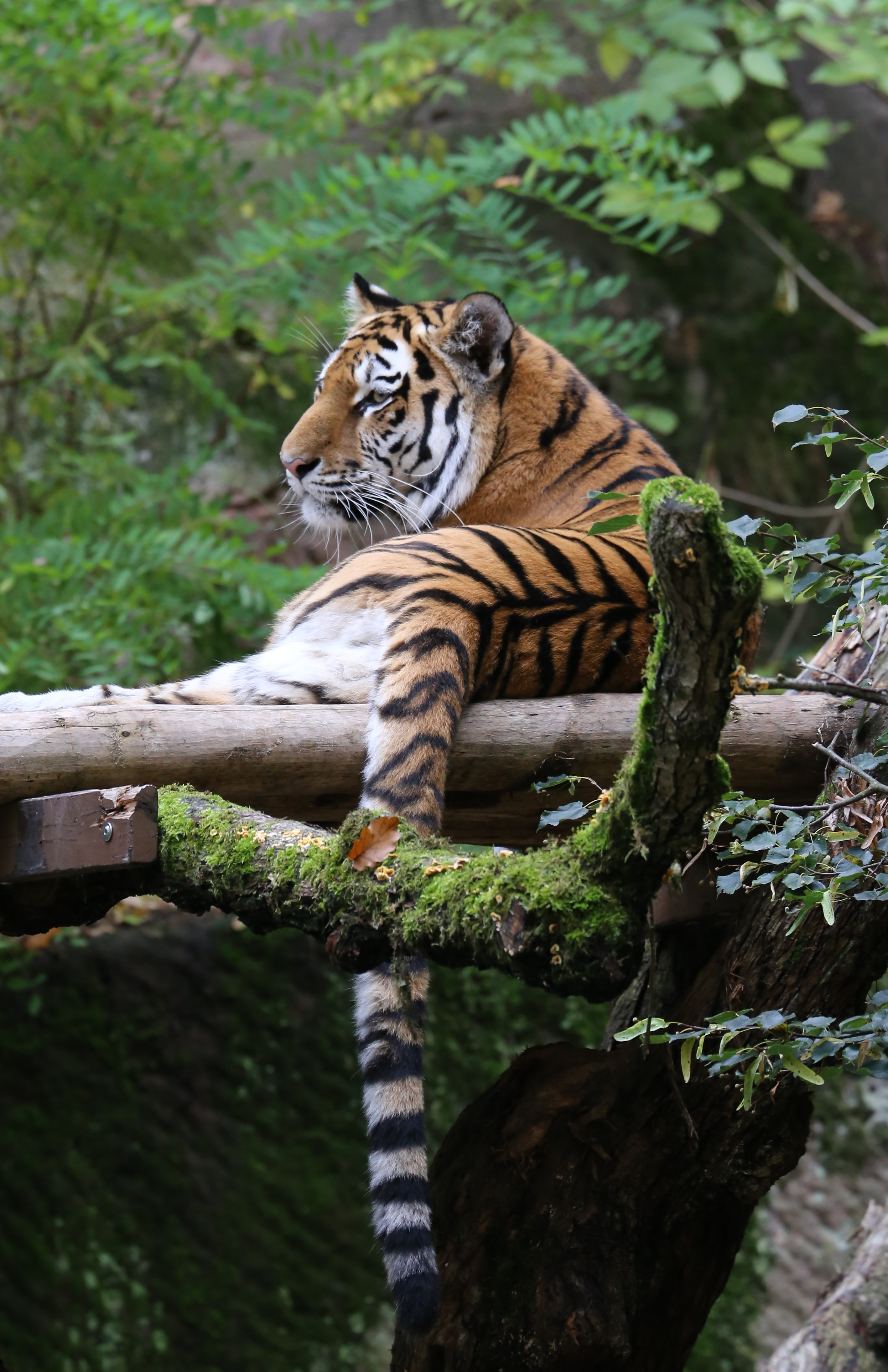 Sibirischer Tiger (Panthera tigris altaica), Tiergarten Nürnberg